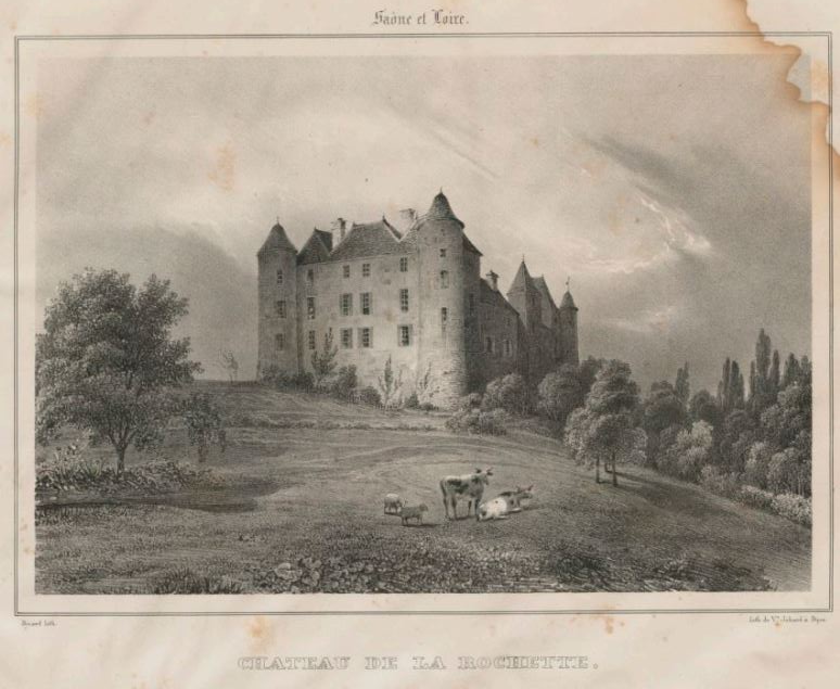 Dessin dans voyage pittoresque en Bourgogne ou Description historique et vues des monuments antiques, modernes et du Moyen âge.... Partie 2 / [sous la direction de Charles-Hippolyte Maillard de Chambure, Gabriel Peignot et Boudot] Éditeur : impr. Vve Brugnot (Dijon) Éditeur : impr. Vve Jobard, 1833-1835 (Grenoble)